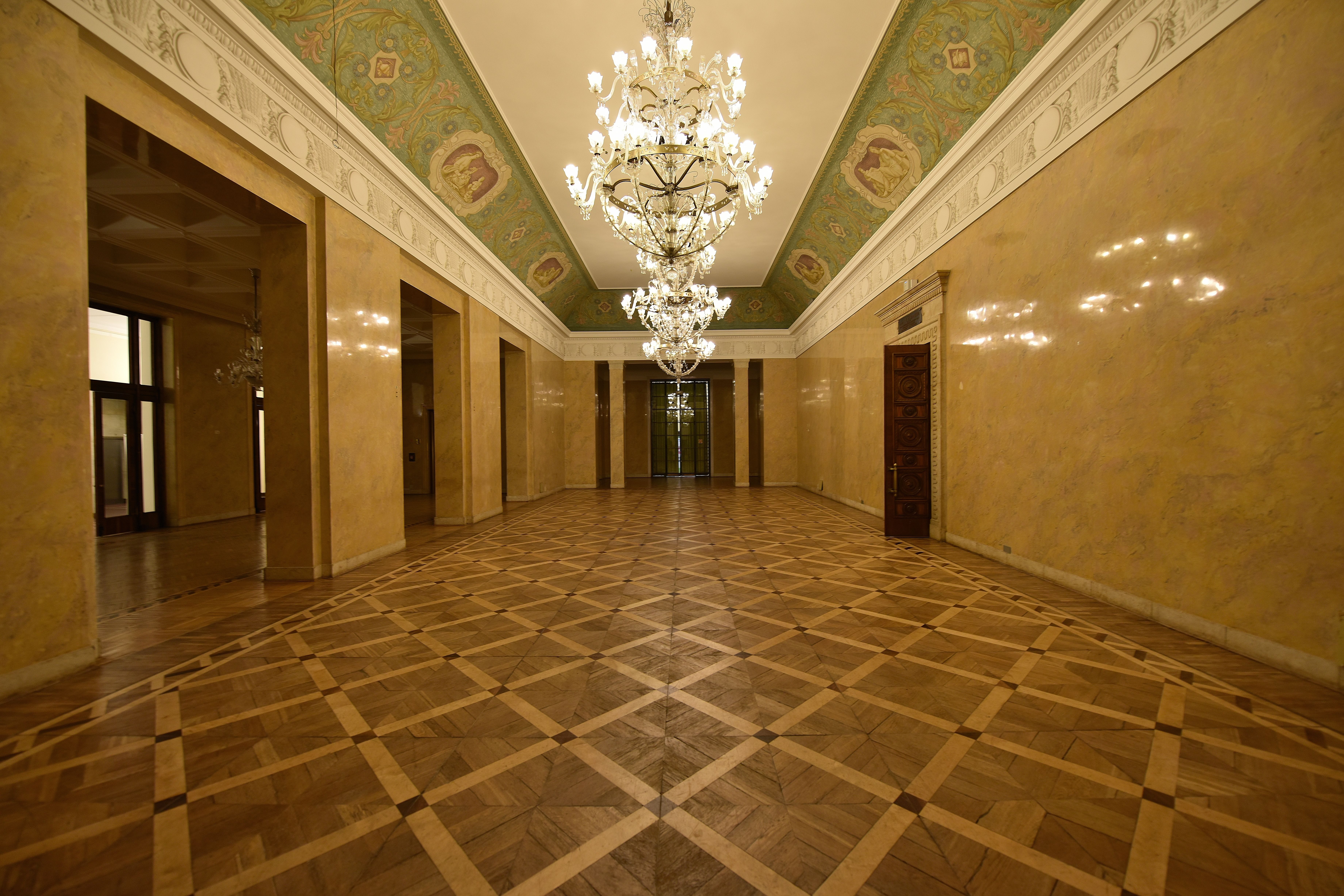 Sala im. Władysława Broniewskiego w Pałacu Kultury i Nauki